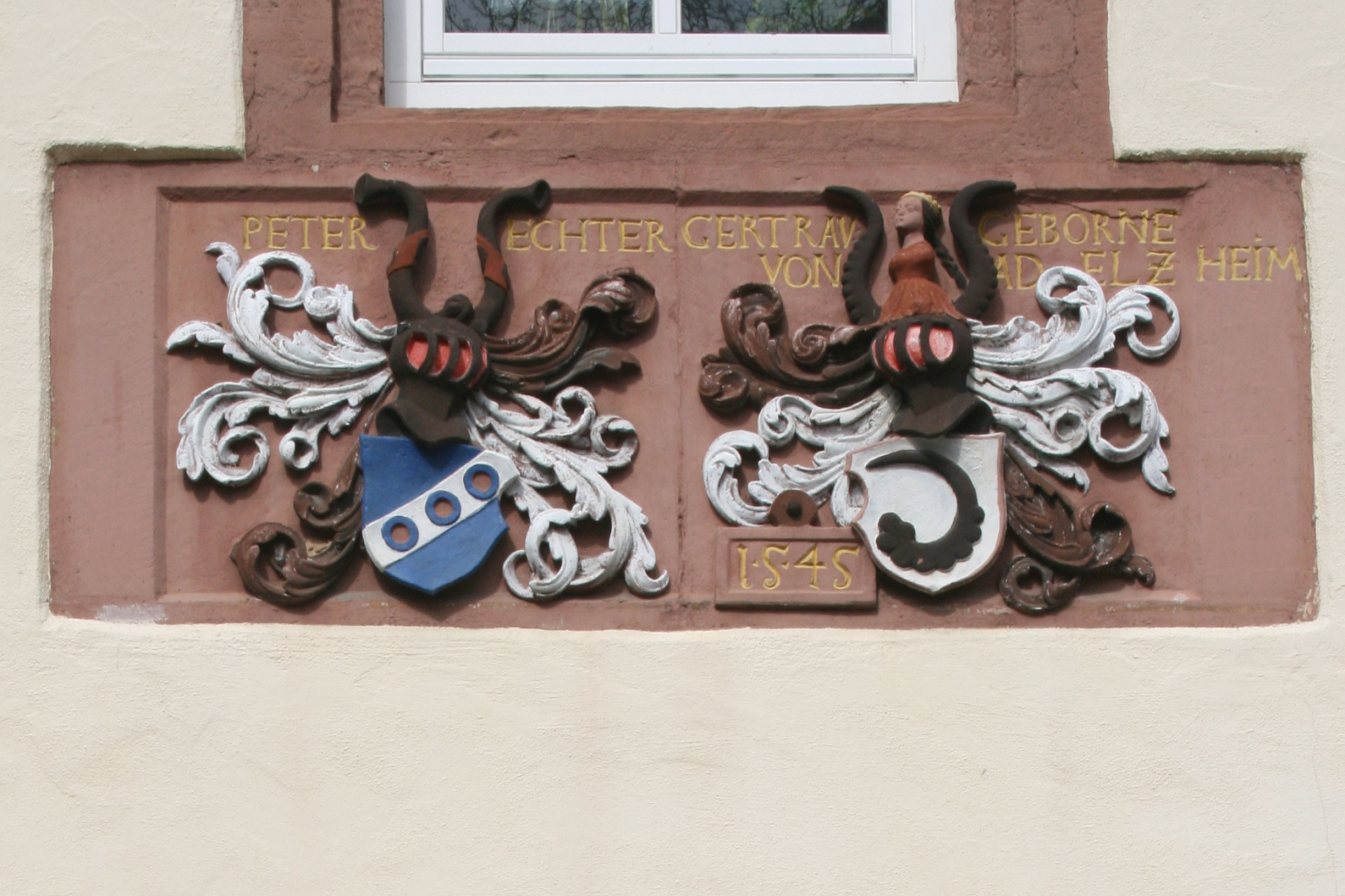 Wappen der Familie Echter am ehemaligen Burgmannenhaus Städtel 17 in Erbach, Odenwald (Allianzwappen mit von Adelsheim).